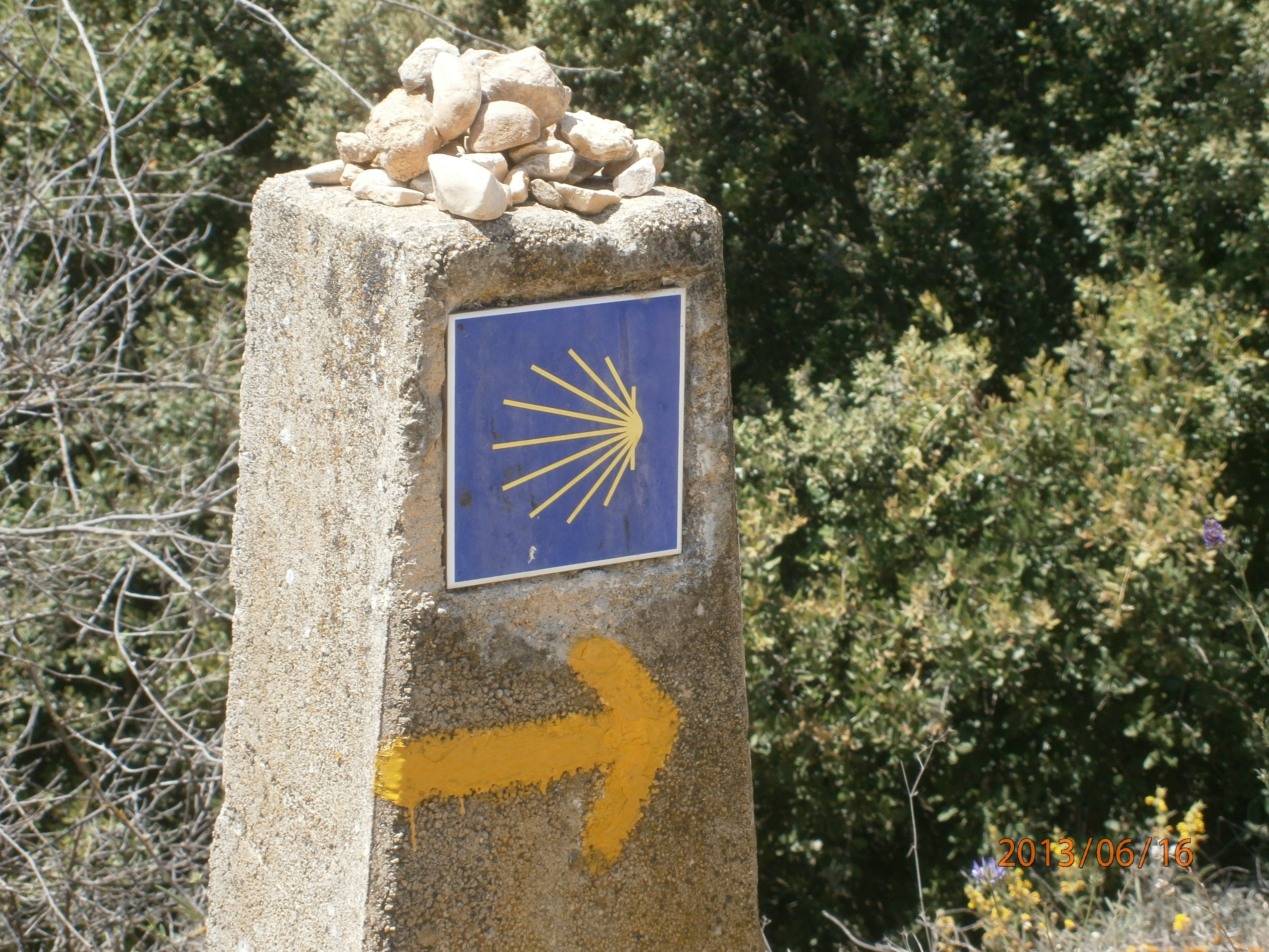 Fita del Camí de Sant Jaume